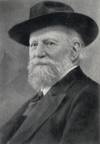 Riproduzione foto di Filippo Zamboni del 11 April 2010, collezione Francesco Paolo Frontini